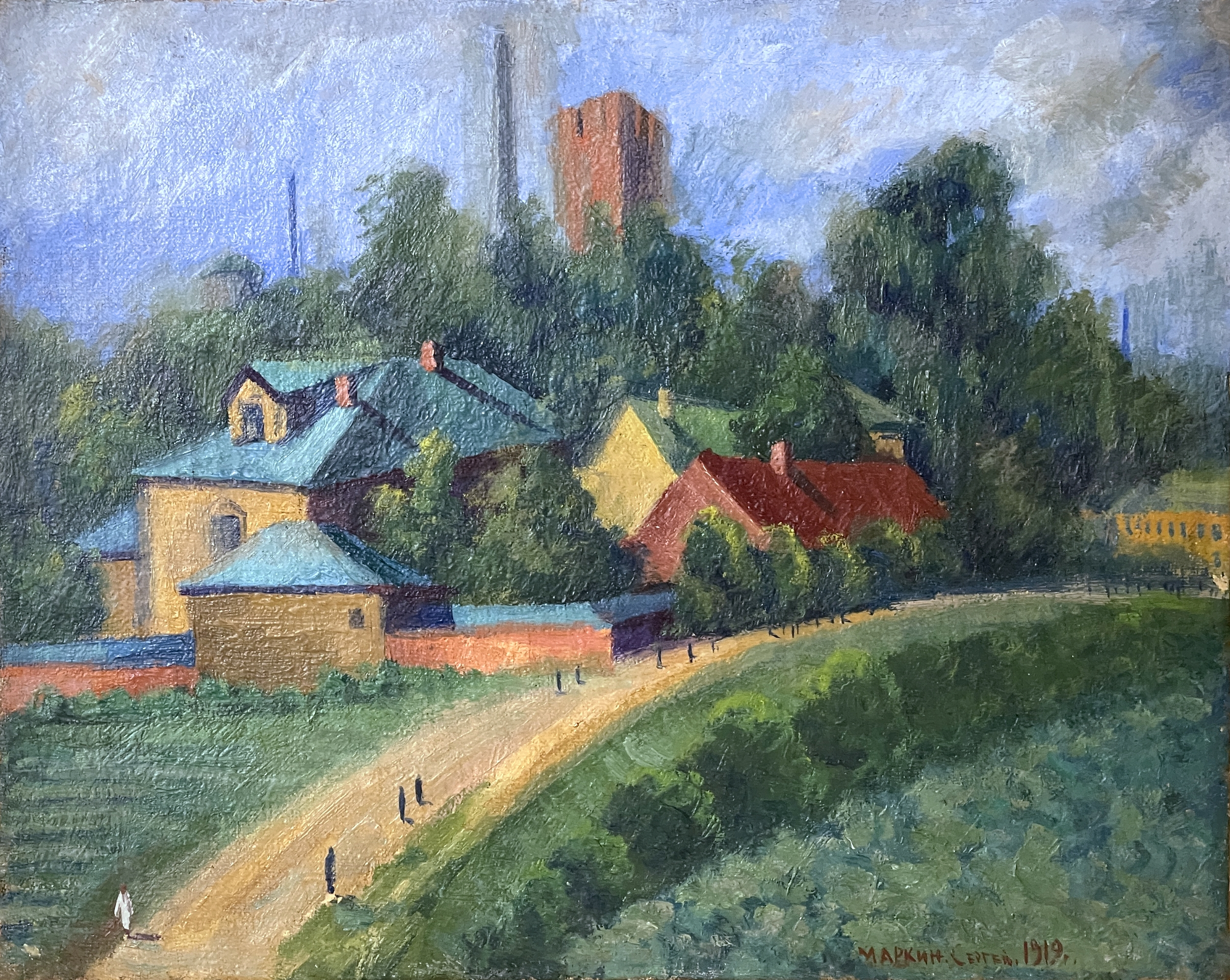 Московский район Благуша. Художник Сергей Маркин, 1919 год